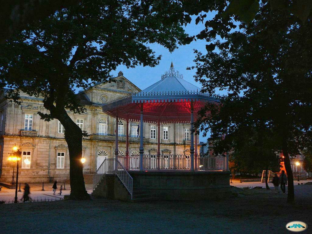 Pontevedra-Palco e Deputación